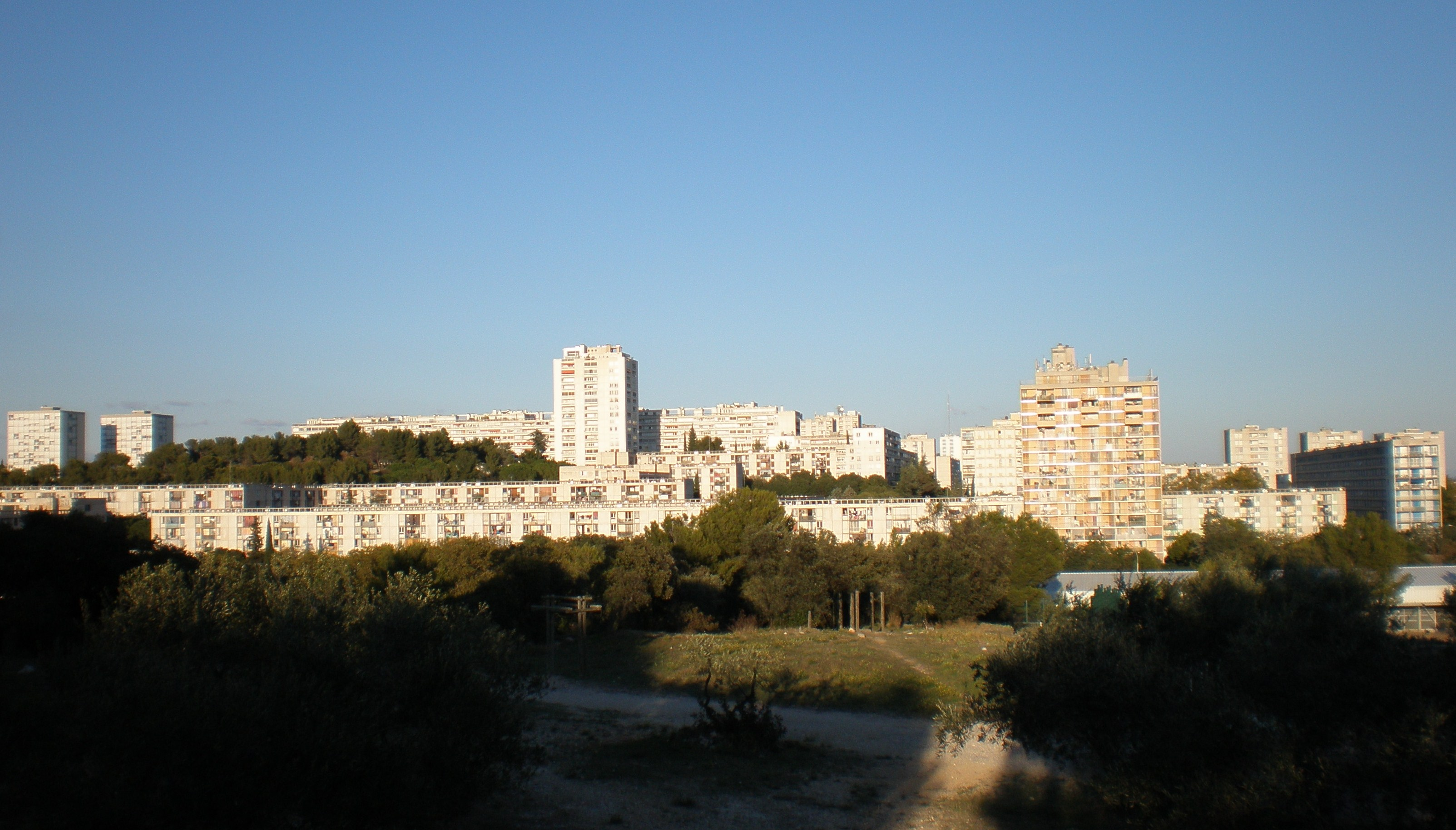 Vue d'ensemble du quartier de Pissevin (ZUP) à Nîmes, grand ensemble de logements construits dans les années 1960